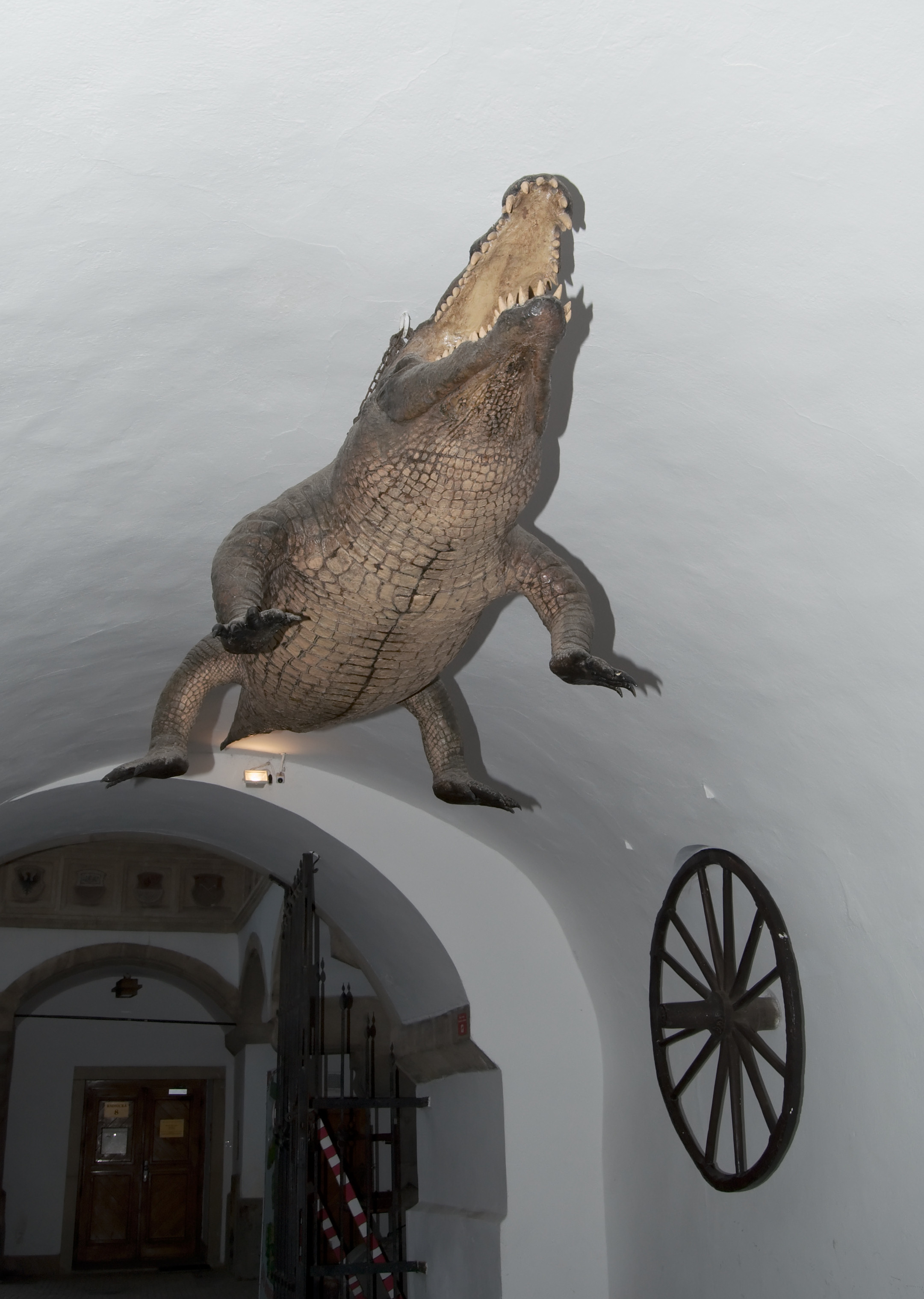 Pověstmi opředené objekty „Brněnské kolo“ a „drak“ v průjezdu brněnské Staré radnice